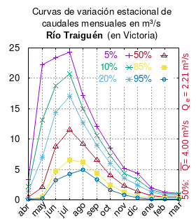 Curvas de variación estacional del río Traiguén en Victoria. # Dirección General de Aguas # Diagnóstico y clasificación de los cursos y cuerpos de agua según objetivos de calidad. Cuenca del río Imperial. # Santiago de Chile # Ministerio de Obras Públicas (Chile) # 2004 # url: # urlarchivo: # Tabla 4.4: Río Traiguén en Victoria (m3/s) , pág. 48 mes 5% 10% 20% 50% 85% 95% abr 3.290 2.182 1.327 0.513 0.159 0.080 may 22.257 13.177 6.983 2.075 0.466 0.193 jun 23.354 18.781 14.424 8.706 4.675 3.245 jul 24.332 20.785 17.088 11.503 6.542 4.291 ago 17.157 14.962 12.676 9.233 6.249 4.969 sep 12.121 10.570 8.954 6.512 4.343 3.359 oct 8.469 7.252 5.984 4.069 2.367 1.595 nov 5.152 4.375 3.565 2.342 1.256 0.763 dic 4.424 3.394 2.461 1.332 0.626 0.401 ene 1.982 1.600 1.224 0.705 0.312 0.162 feb 1.321 1.067 0.820 0.484 0.236 0.143 mar 1.094 0.924 0.747 0.480 0.242 0.134 This plot was created with Gnuplot.